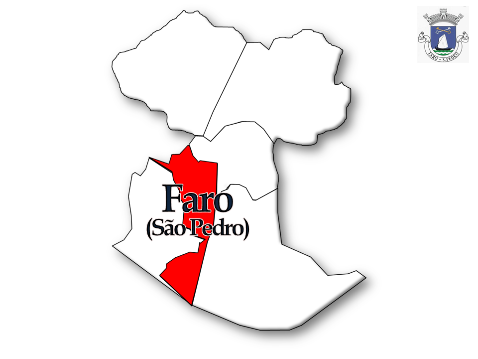 Censos 1864/2011